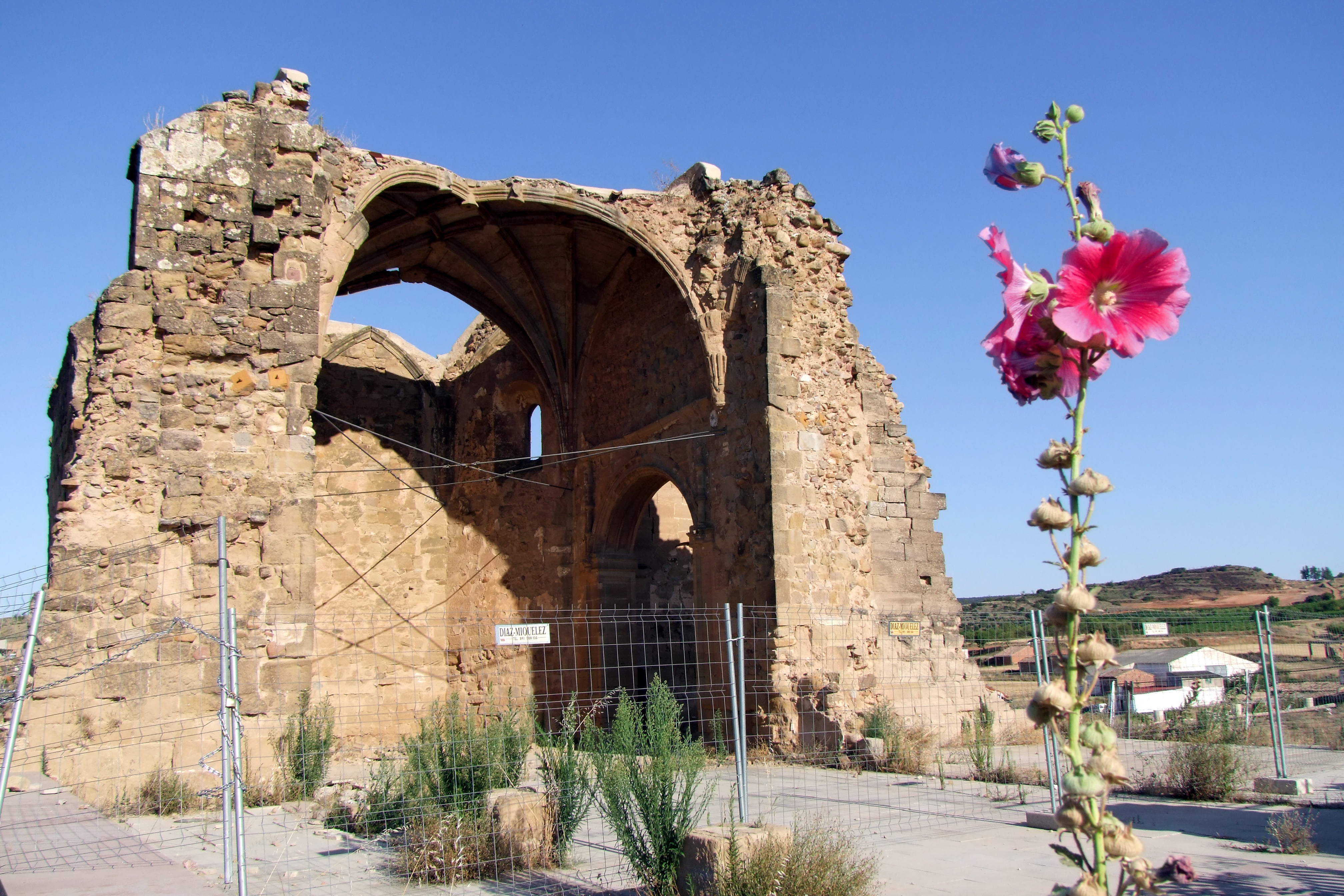 Ermita de San Justo y San Pastor en la localidad de El Redal, La Rioja - España